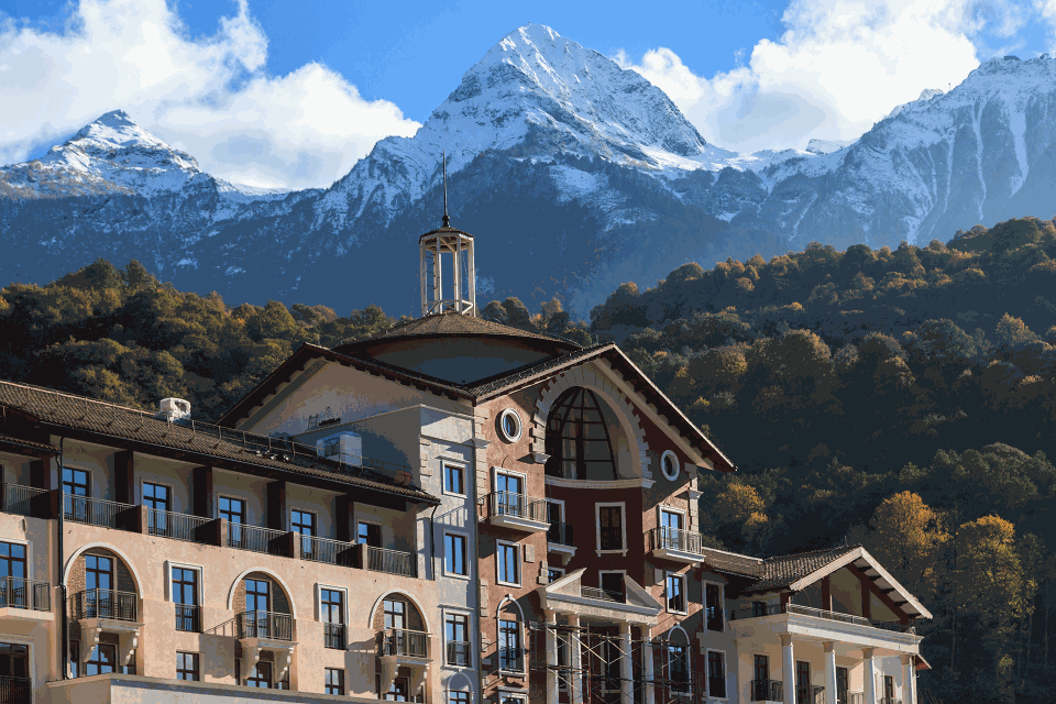 Горки Город уровень +540